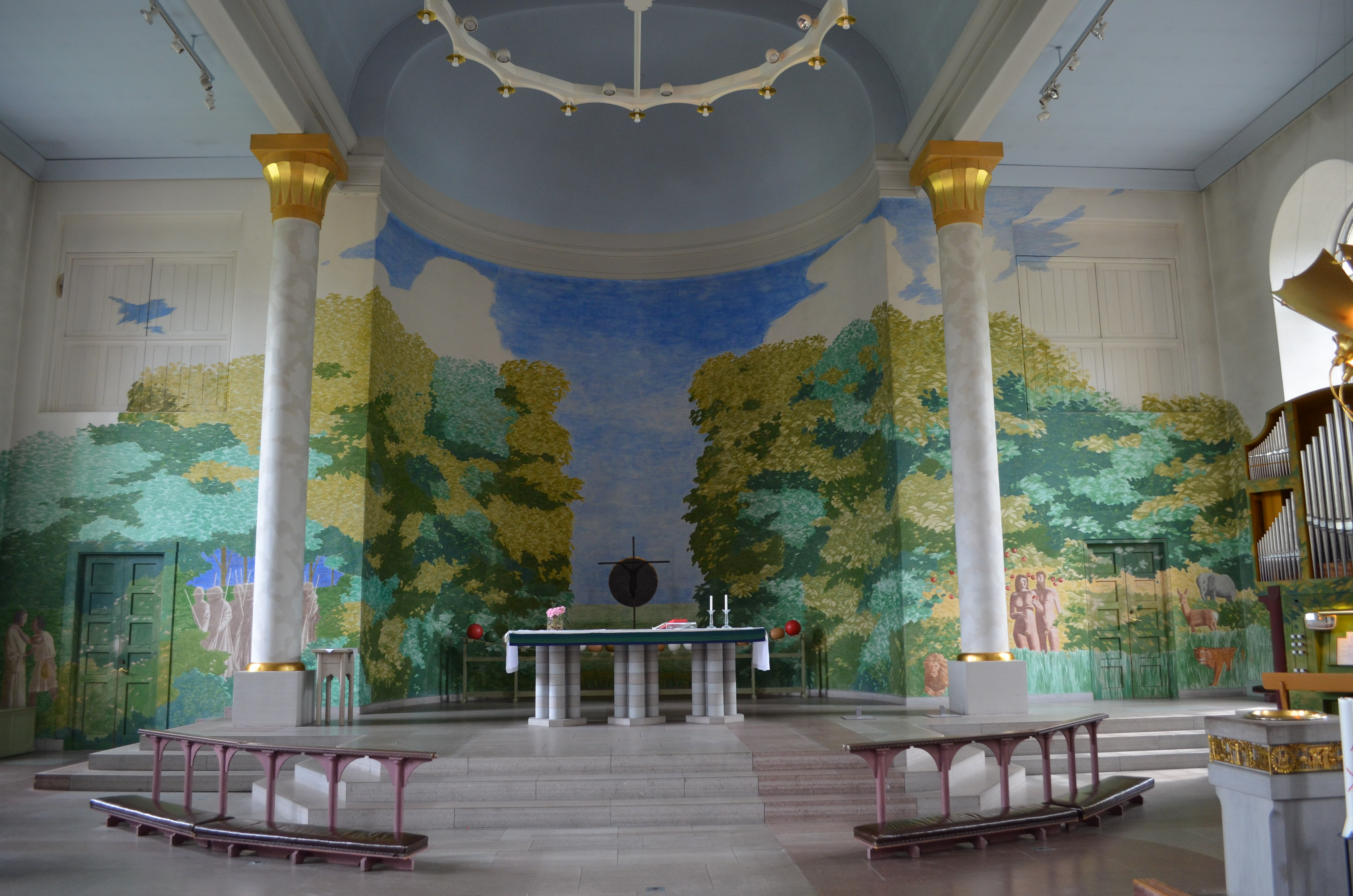 Kumla kyrkas kyrksal med predikstol.